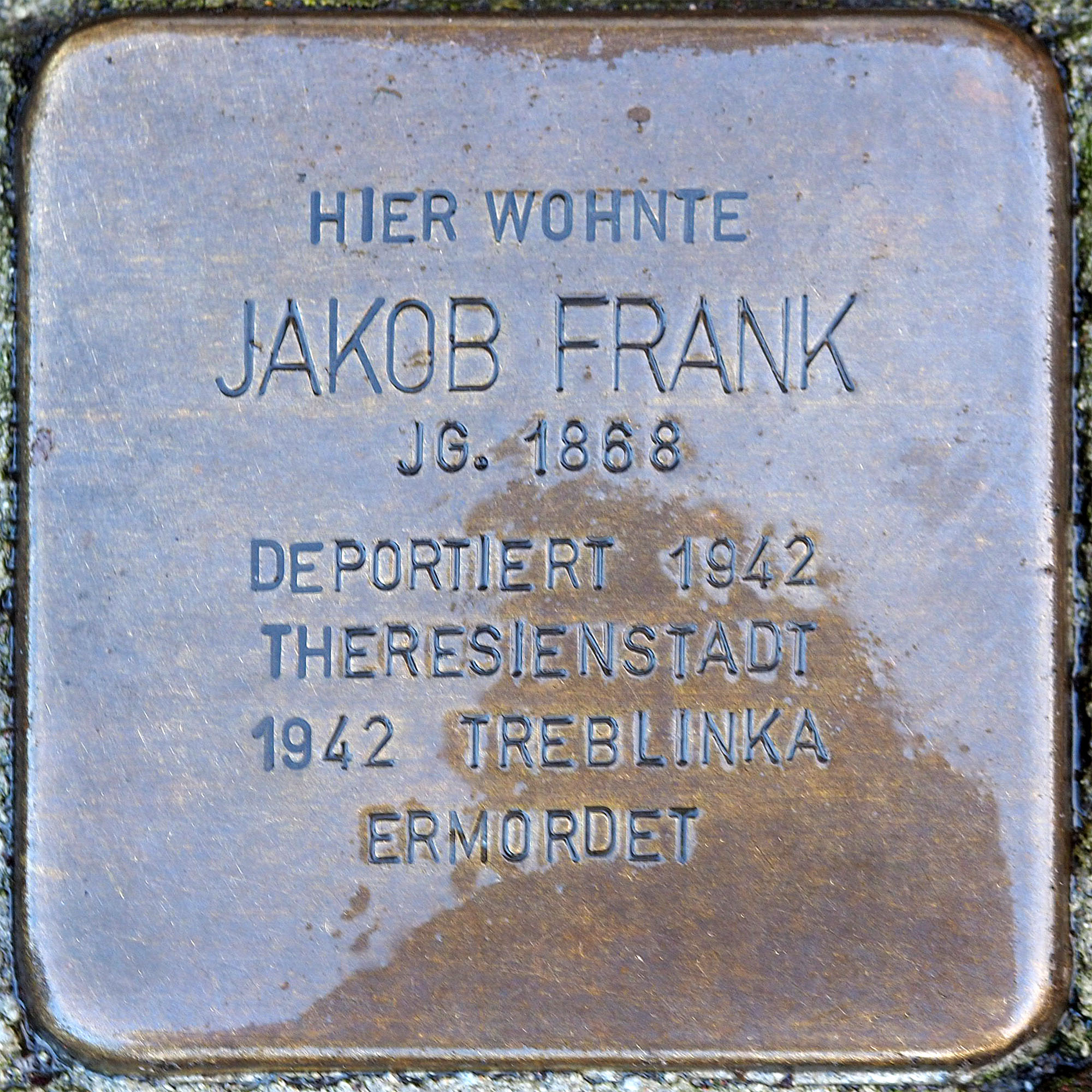 Stolpersteine Grefrath: Frank, Jakob